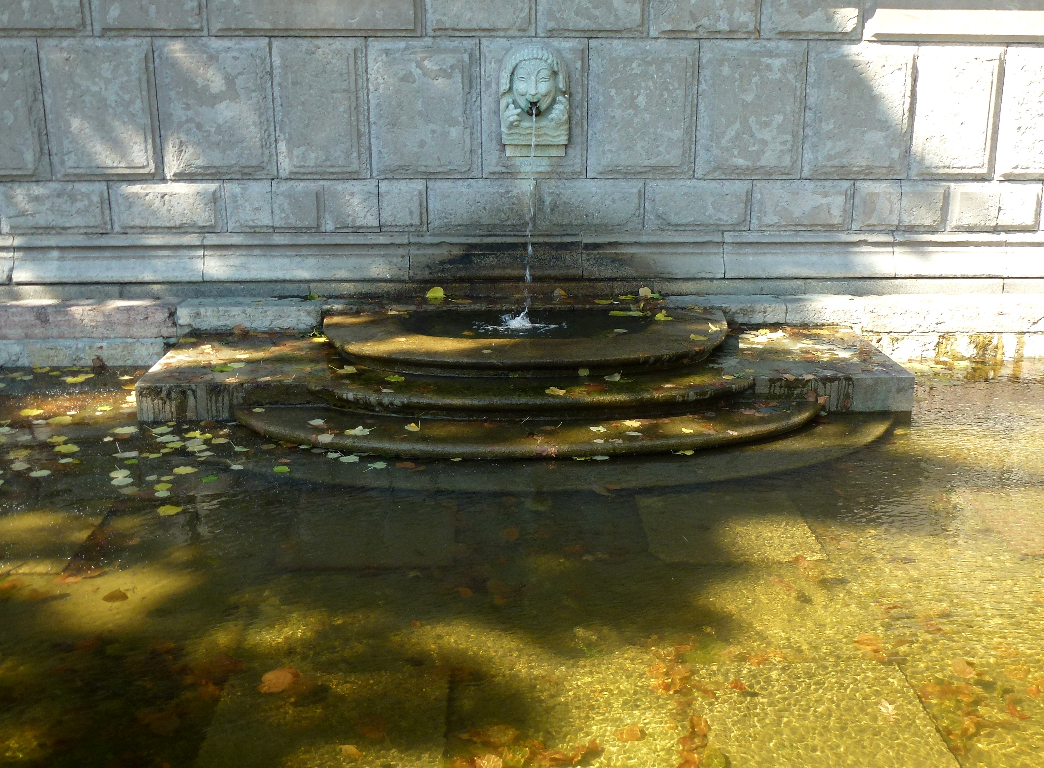 Stadshusparken brunn